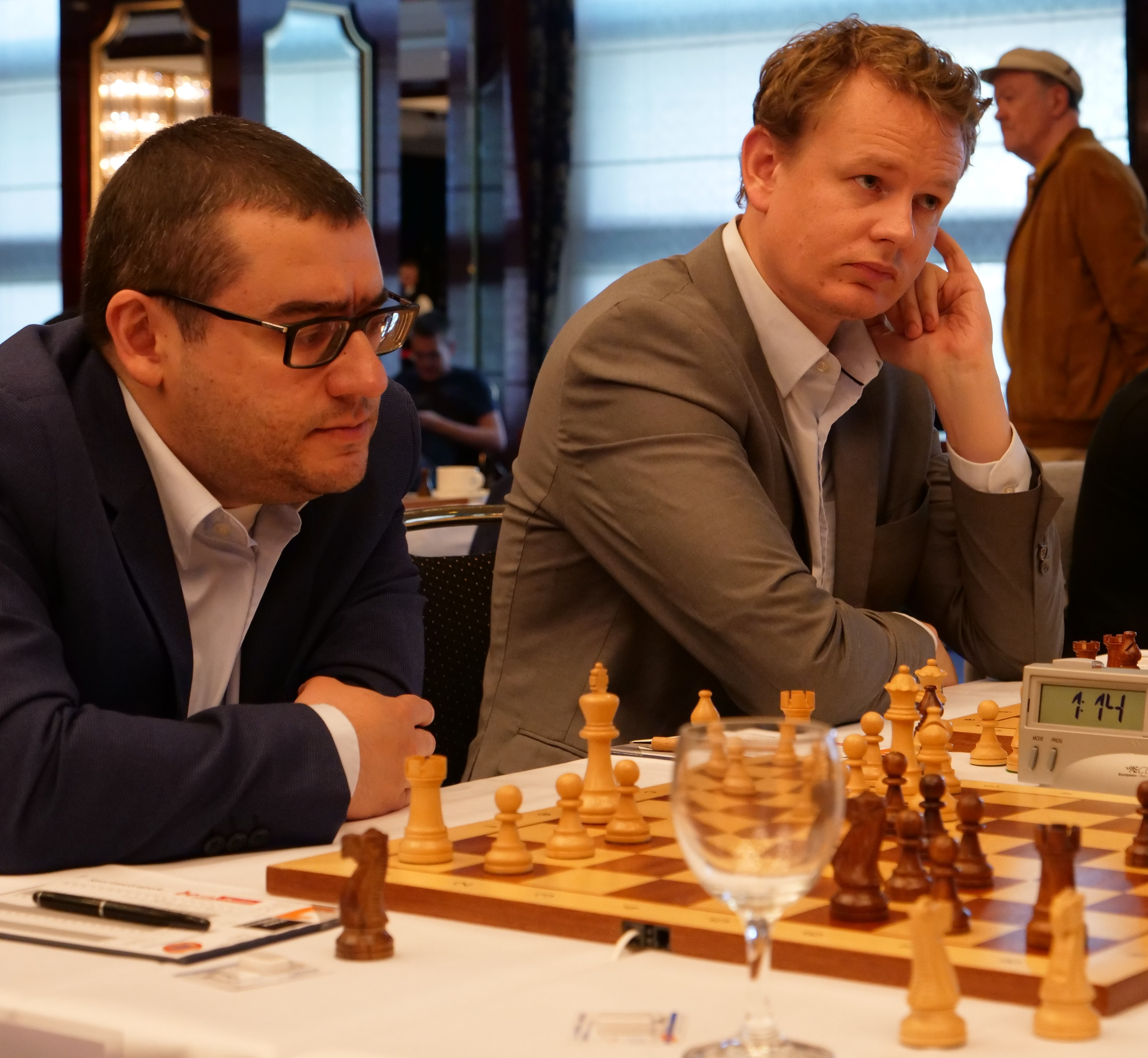 Sergei Movsesian und Lars Gustafsson, Bundesliga-Endrunde, 30-4-2018.